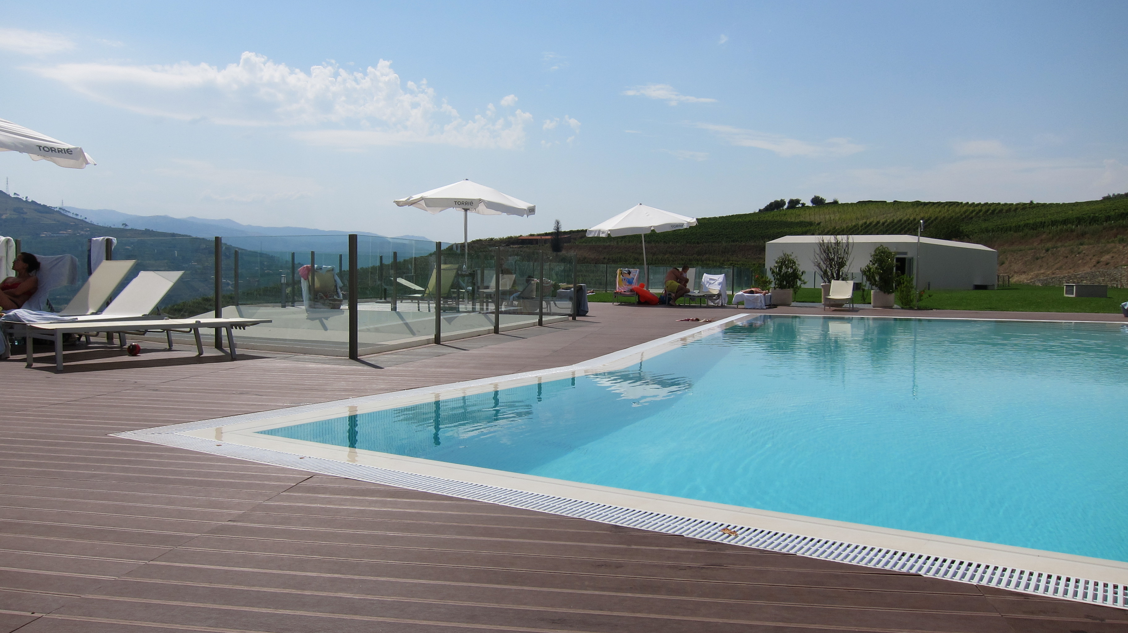 Piscina do Água Hotels Douro Scala